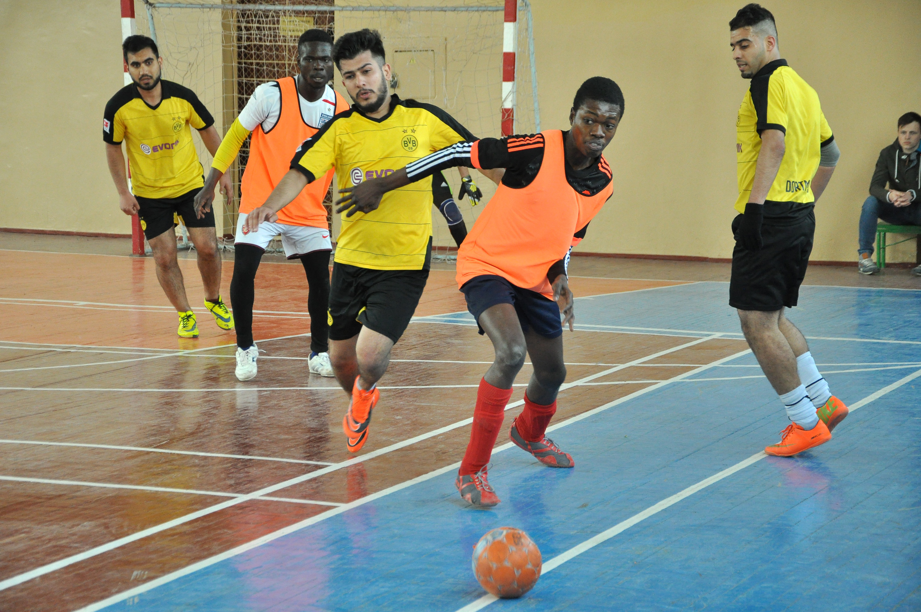 Міні-футбол «Ліга чемпіонів» Тернопільського державного медичного університету імені І. Я. Горбачевського. Півфінальні та фінальний поєдинки 26 квітня 2016 року. Поєдинок між командами Гани та Іраку.